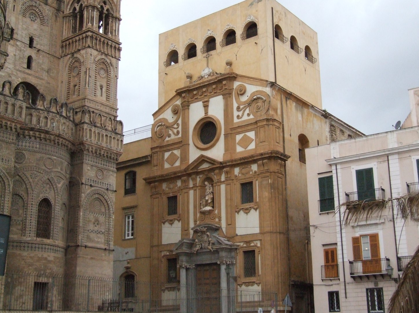 Palermo